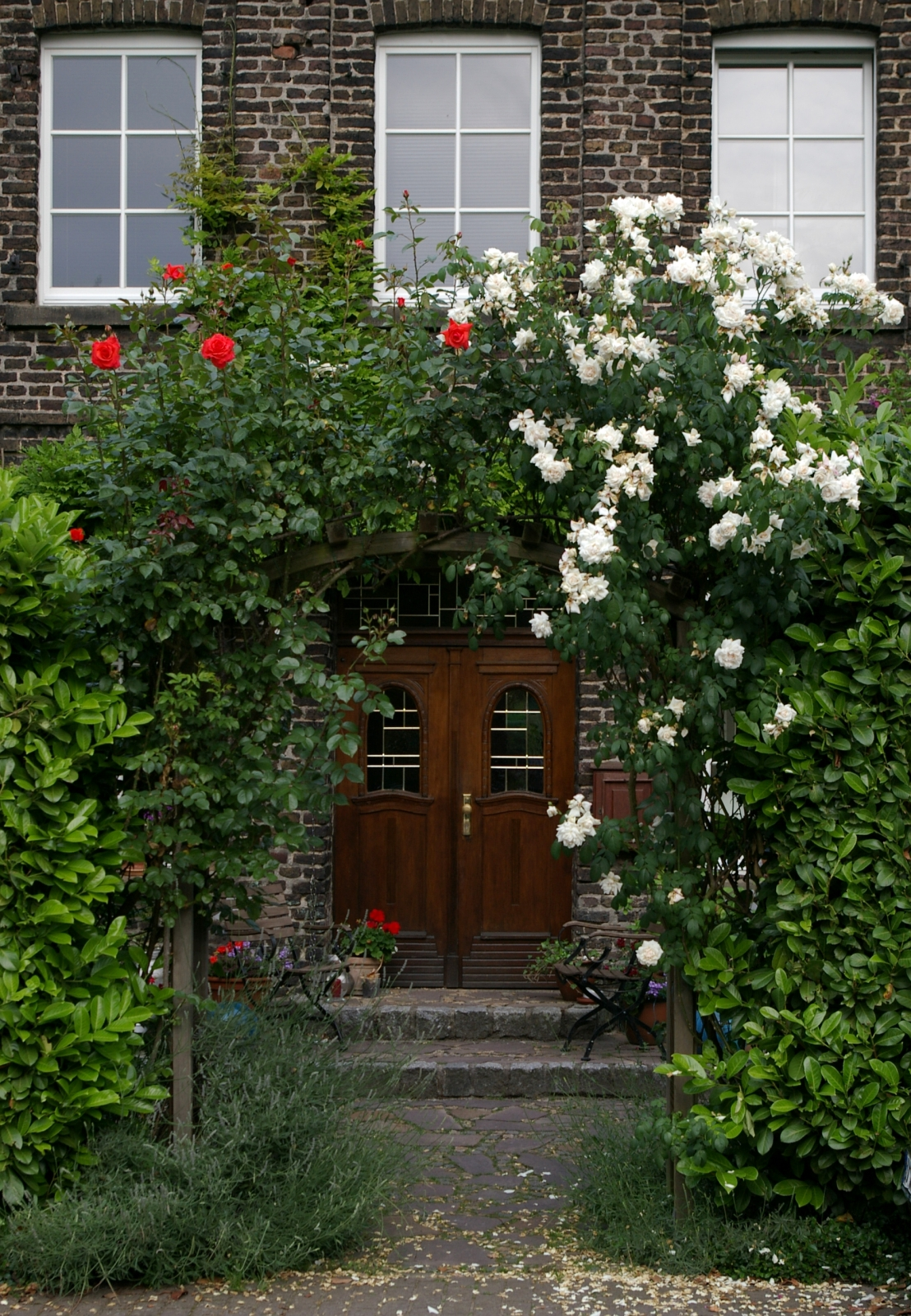 Hauseingang in Uelzen, Unna, Nordrhein-Westfalen